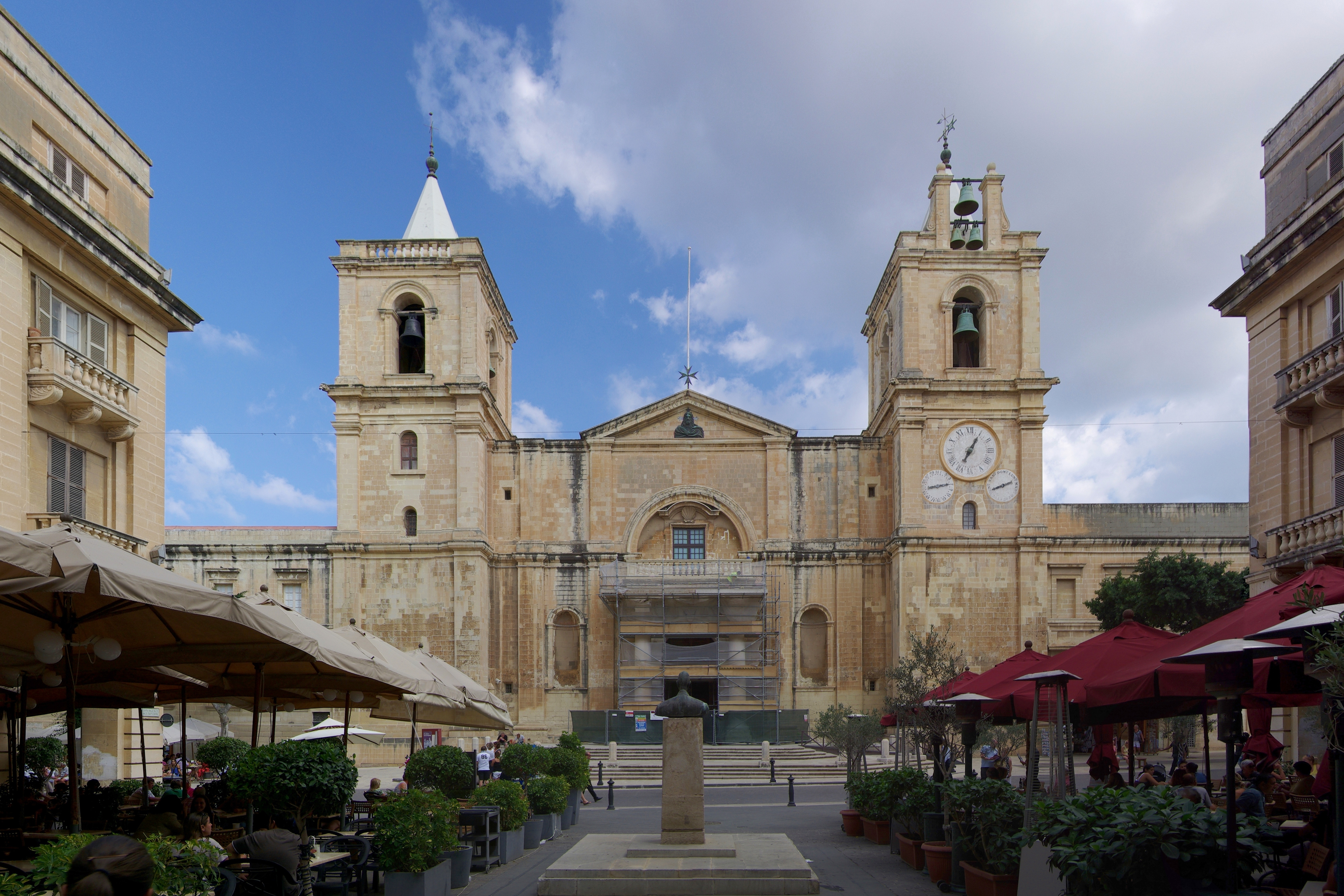 Malta, Valletta, St. Johannes Konkathedrale